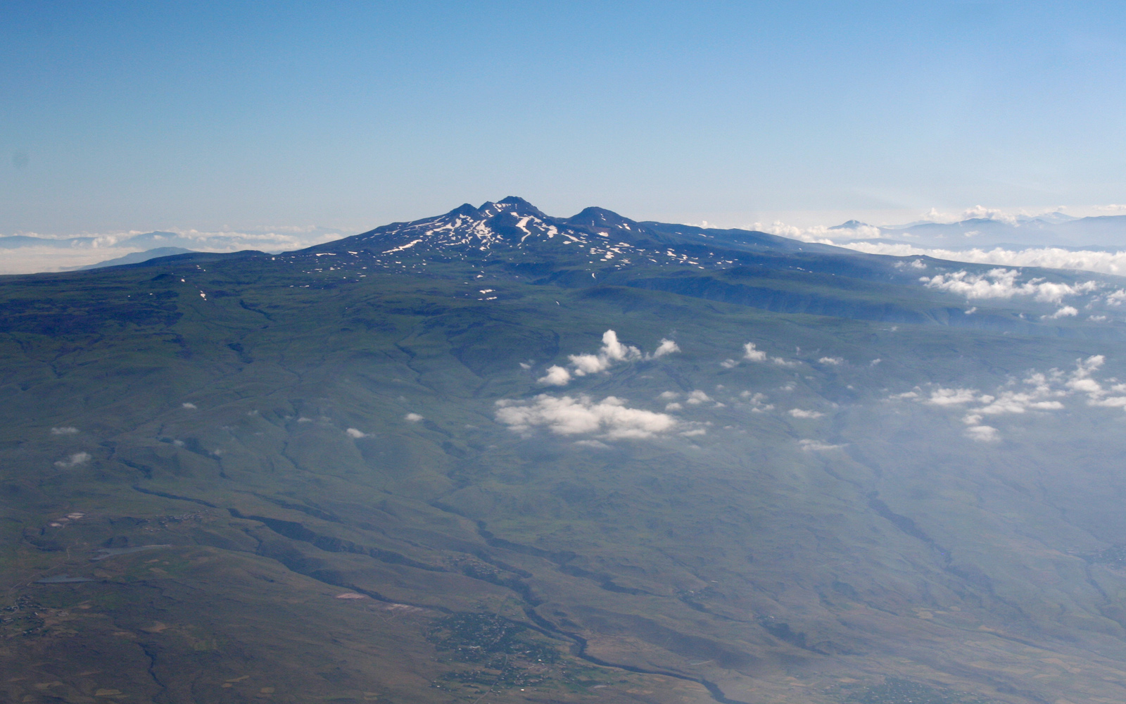 Mont Arakats en Arménie